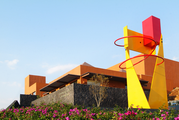 Composición Simple, Centro Cultural Luis Nishizawa, Edo. de México 2007